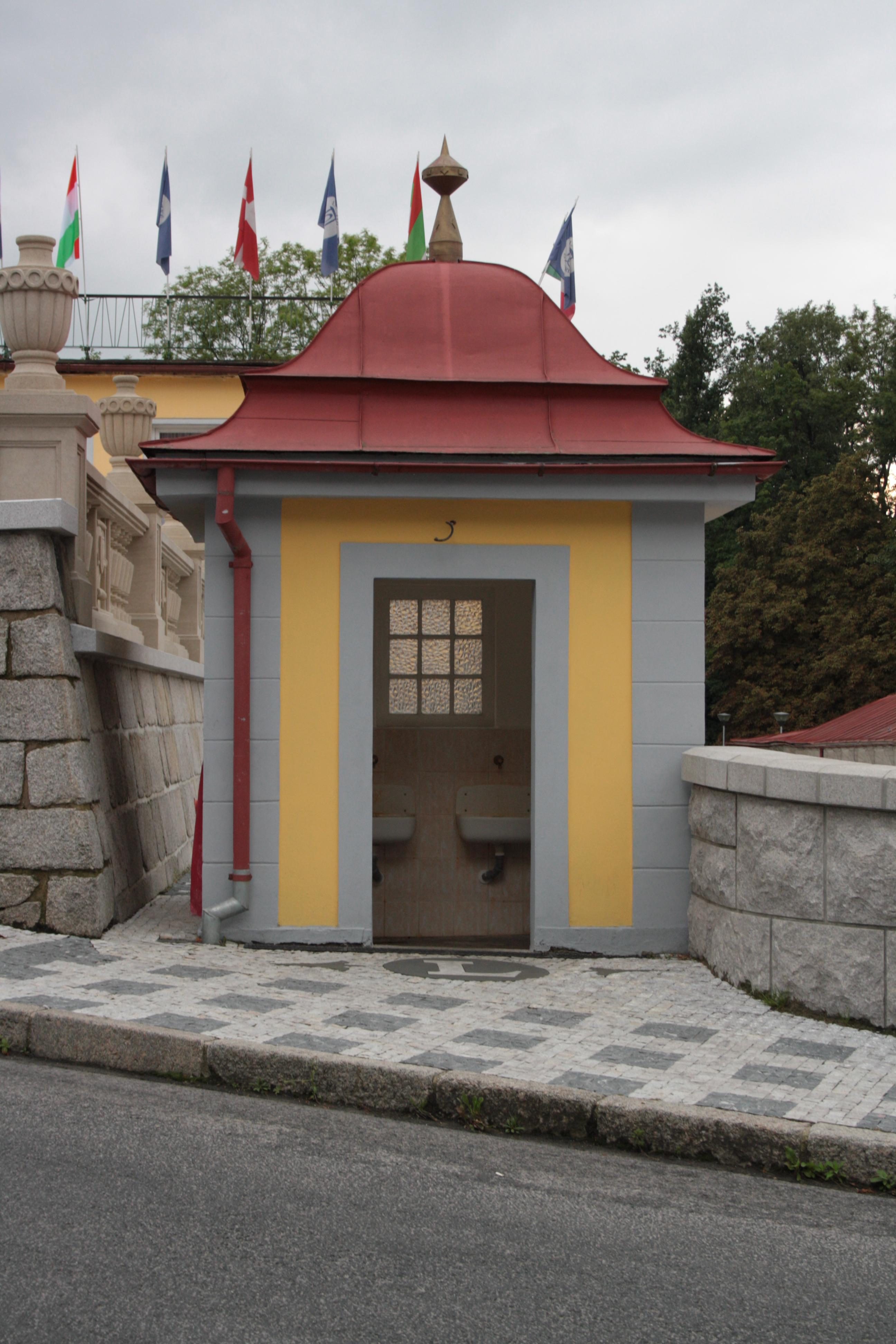 Pitná síň Servitut v Lázních Libverdě.